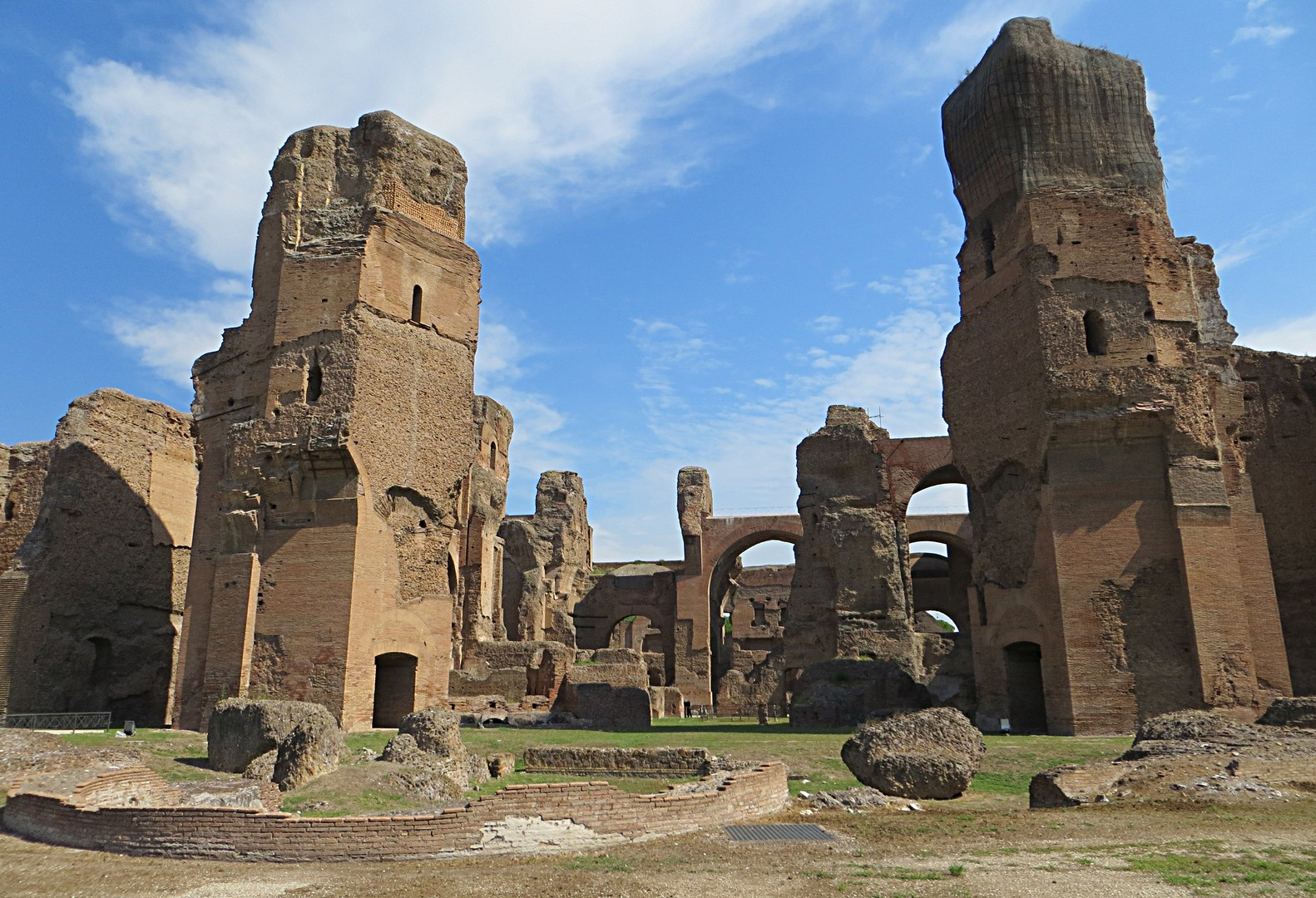 Terme de Caracalla